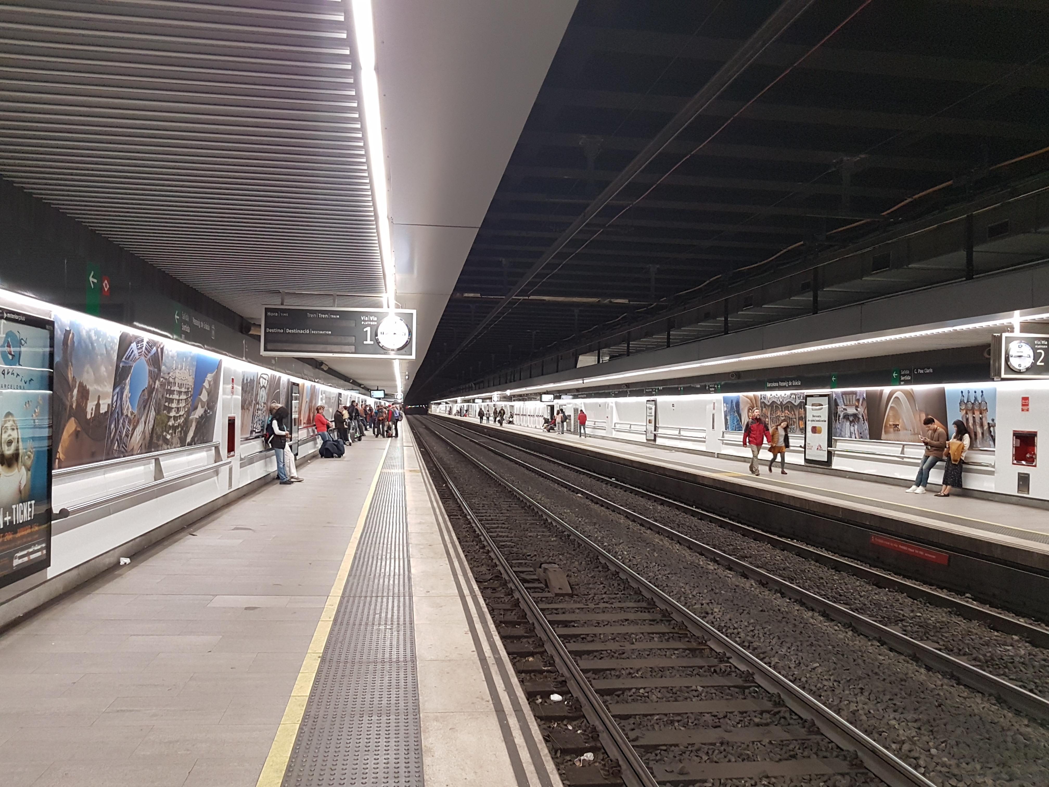 Andanes i vies de l'estació de tren de Barcelona Passeig de Gràcia